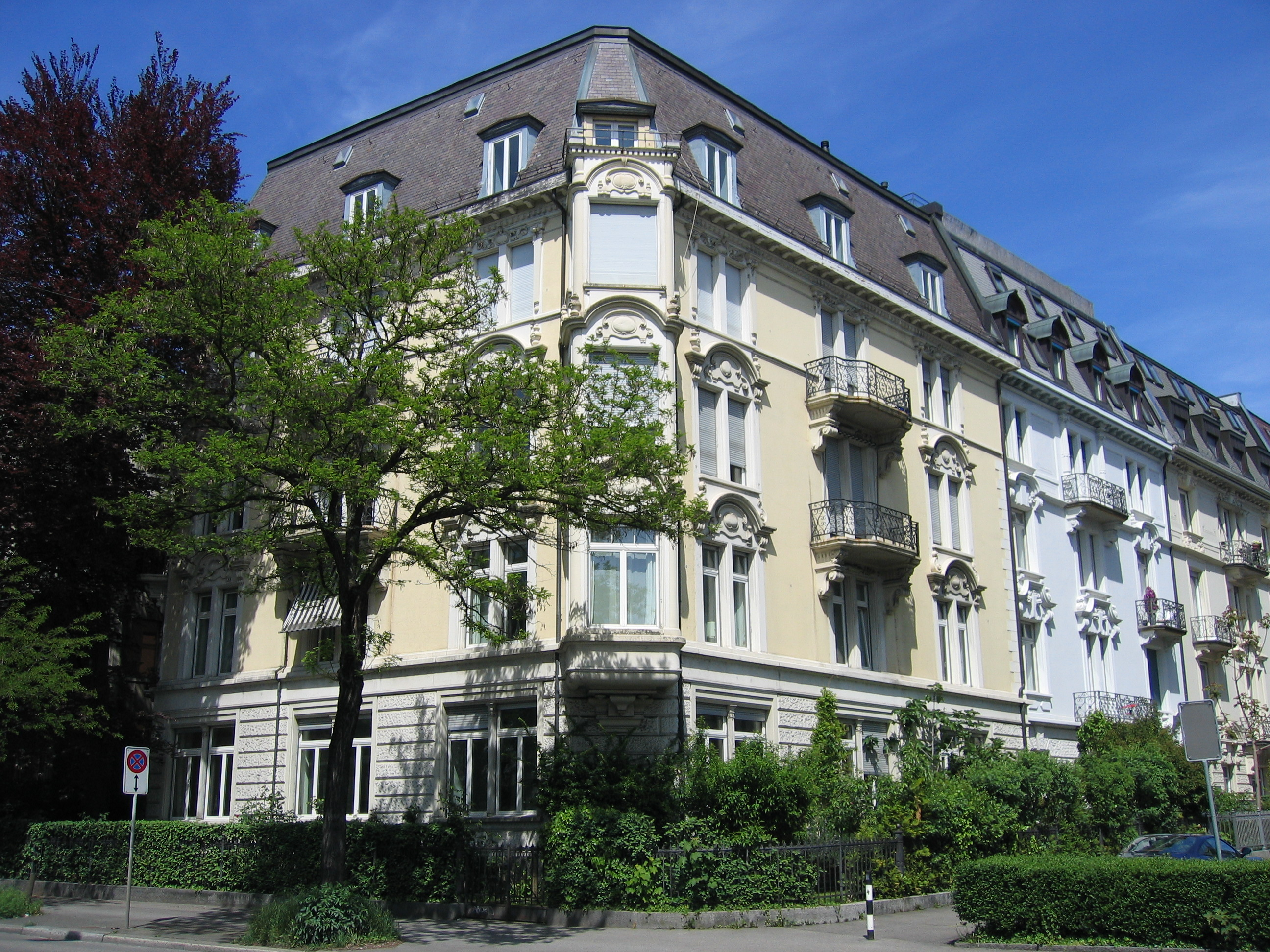 Hannah von Mettals Zürcher Wohnhaus, Bellerivestrasse Nr. 7, in dem sich auch jene Pension Wehrle am See befand, in der sich Georg von Seybel 1924 das Leben genommen hat. In dem Haus befand sich außer der Pension Wehrle, in der auch der österreichische Komponist Anton von Webern zu Gast war, ab Mitte der 1920er Jahre die Praxis des mit Hugo Ball befreundeten, von Carl Gustav Jung ausgebildeten Psychoanalytikers Josef Bernhard Lang (1881-1945), der zwischen 1916 und 1919 Hermann Hesse behandelt hat und diesem bis an sein Lebensende freundschaftlich verbunden war, wovon ein umfangreicher Briefwechsel zeugt. In der Pension Wehrle lebte auch Ruth Wenger, die Anfang der 1920er Jahre mit Josef Lang liiert und später ein paar Jahre mit Hesse verheiratet war, der sie in der Pension Wehrle besucht hat.